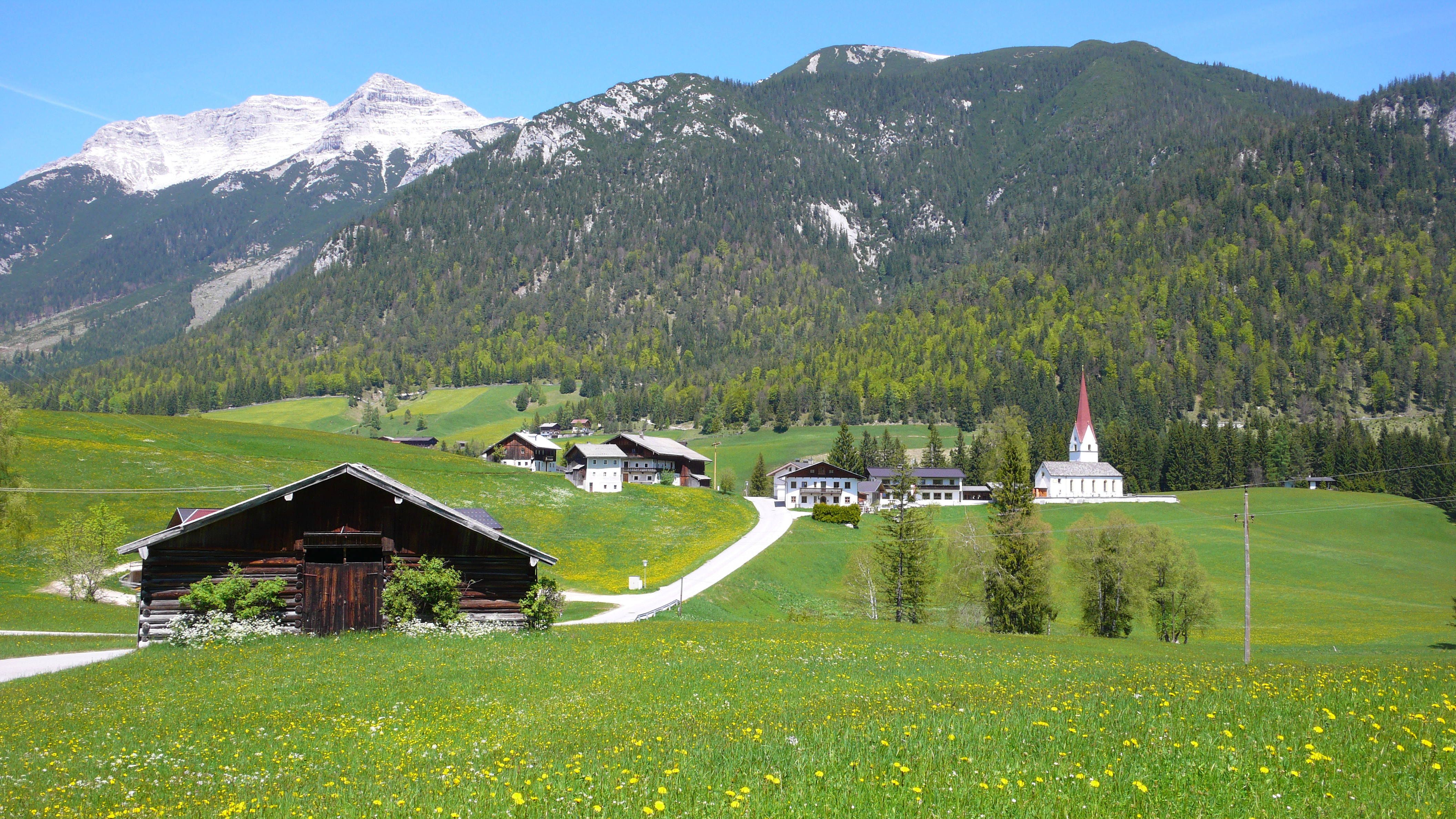 Steinberg am Rofan mit dem Guffert (2194 m) und der Kath. Pfarrkirche hl. Lambert.